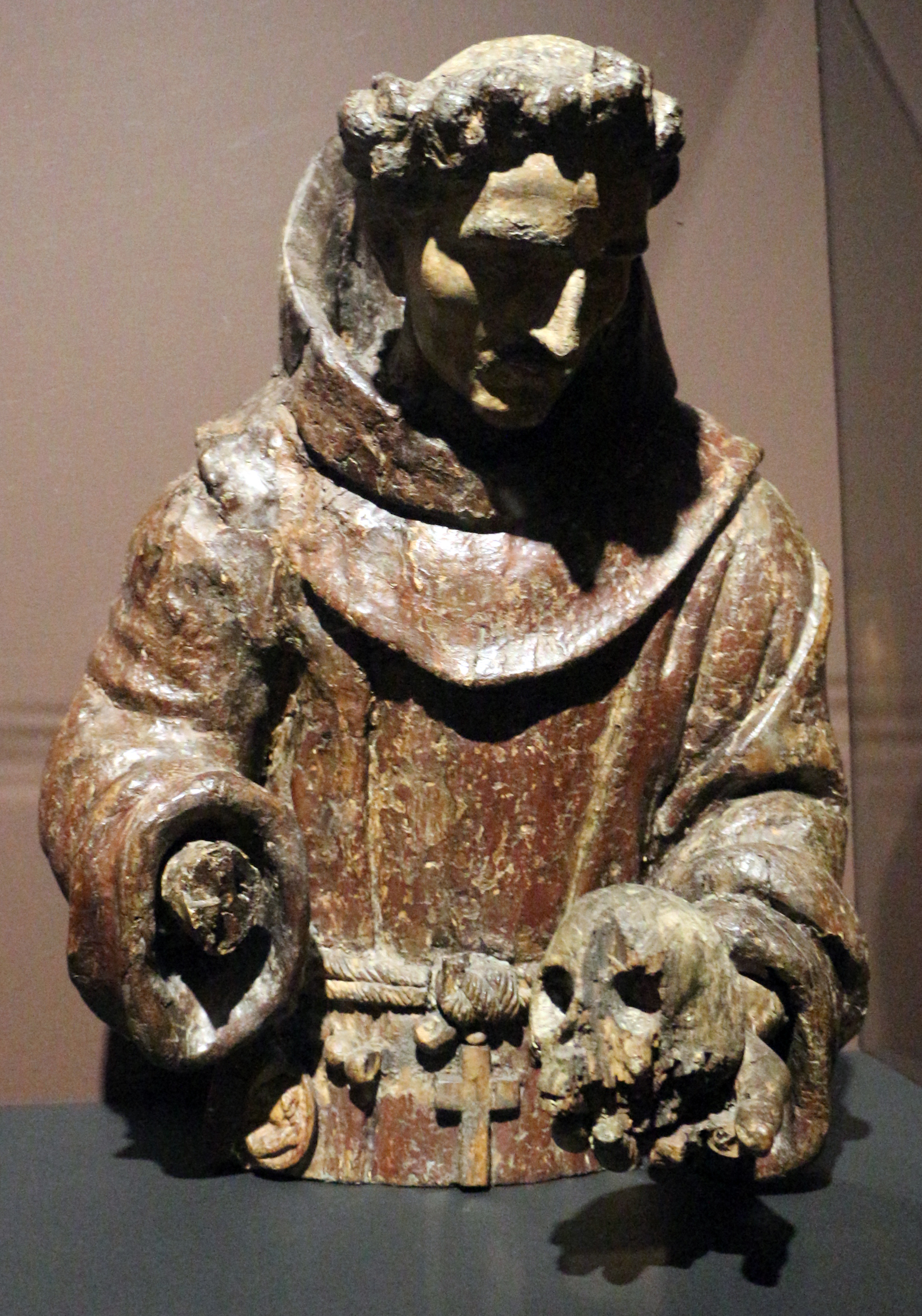 Paesi bassi del sud, san francesco penitente, 1700 ca. (weer, gemeentemuseum).JPG